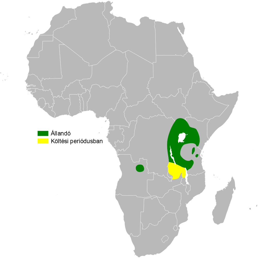 Psalidoprocne albiceps distribution map, based on